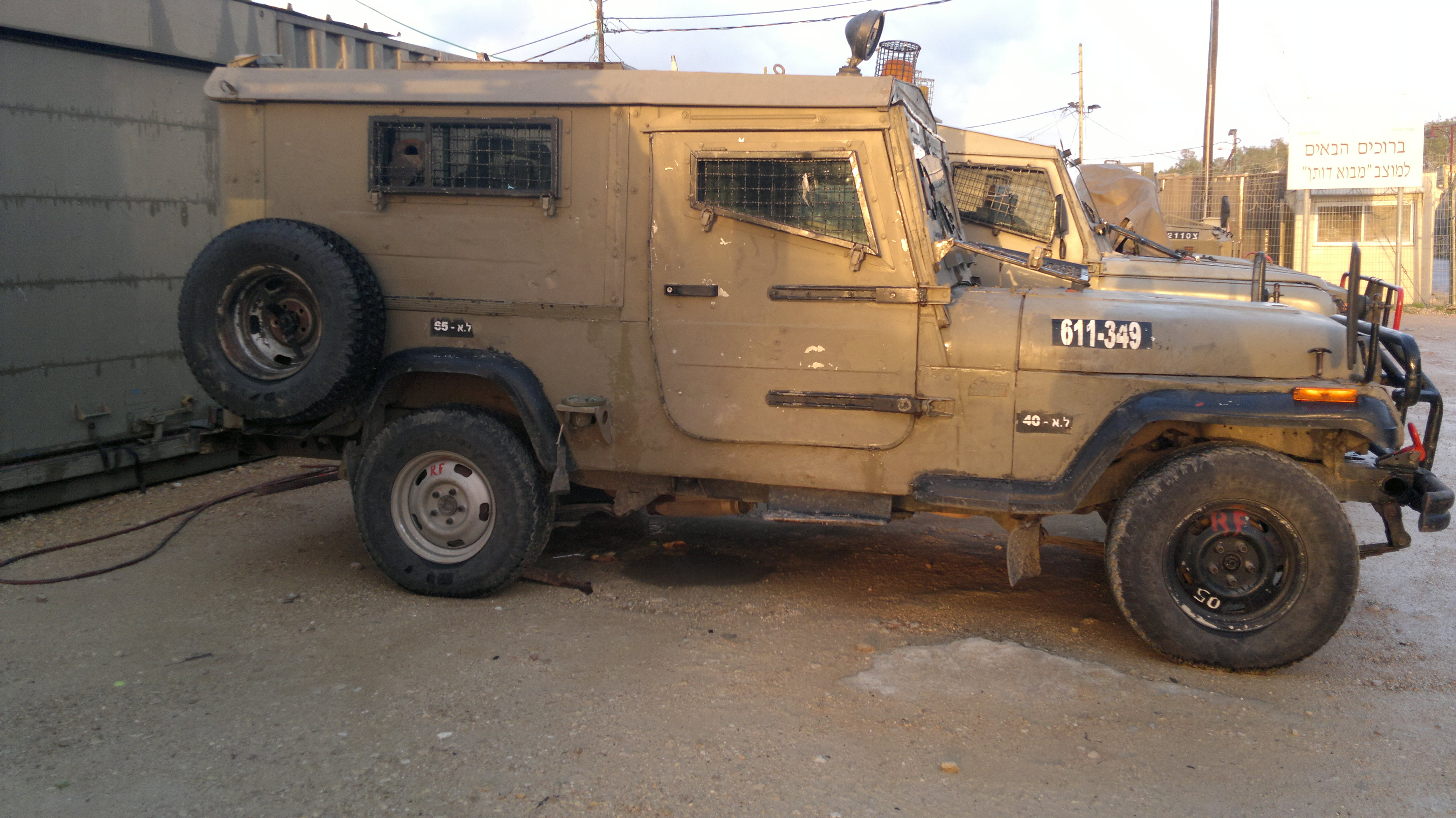 סופה ממוגנת